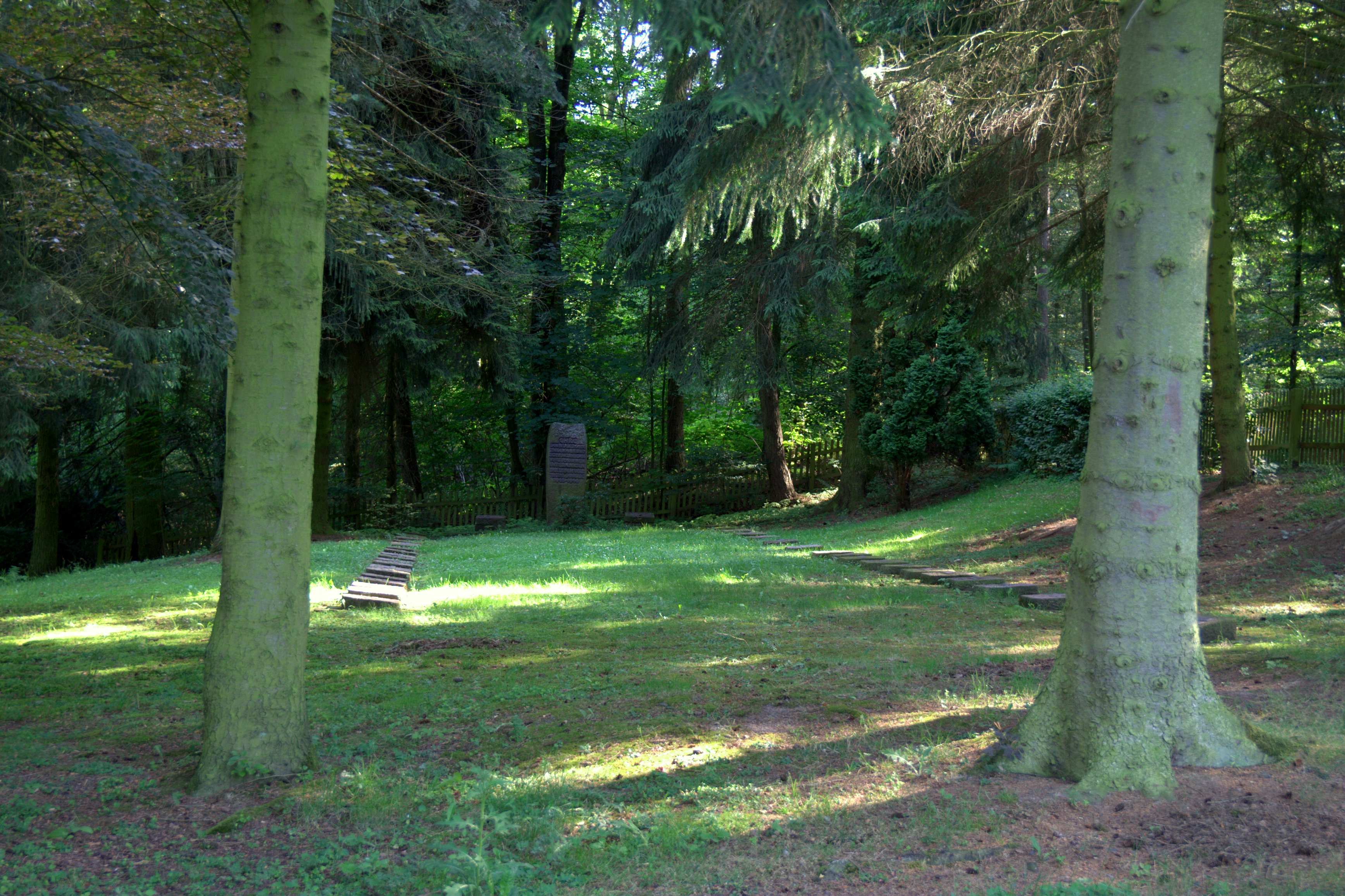 Blick auf den Gedenkort Waldfriedhof Trutzhain